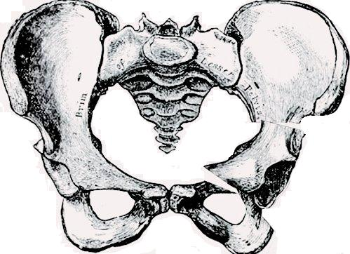 Pfannenschwenkung (Triple-OT) am Becken. Darstellung am Wikimedia-Commons-Bild: "Gray242.png"